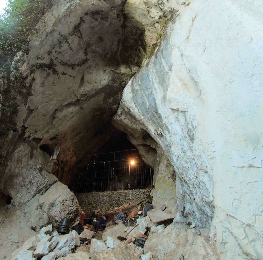 Ciota Ciara, sono visibili la recinzione che protegge l'ingresso originario e lo scavo del Paleolitico medio